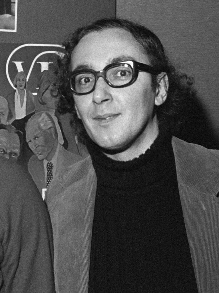 Voorpremière de van de Nederlandse film "VD", v.l.n.r. Wim Verstappen (regisseur), Sonja Barend, Kees Brusse en producent Pim de la Parra voor affiche 15 december 1972